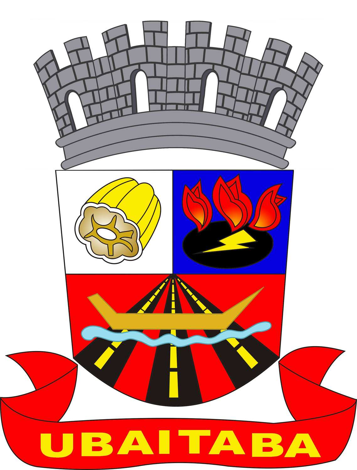 Brasão da cidade de Ubaitaba na Bahia